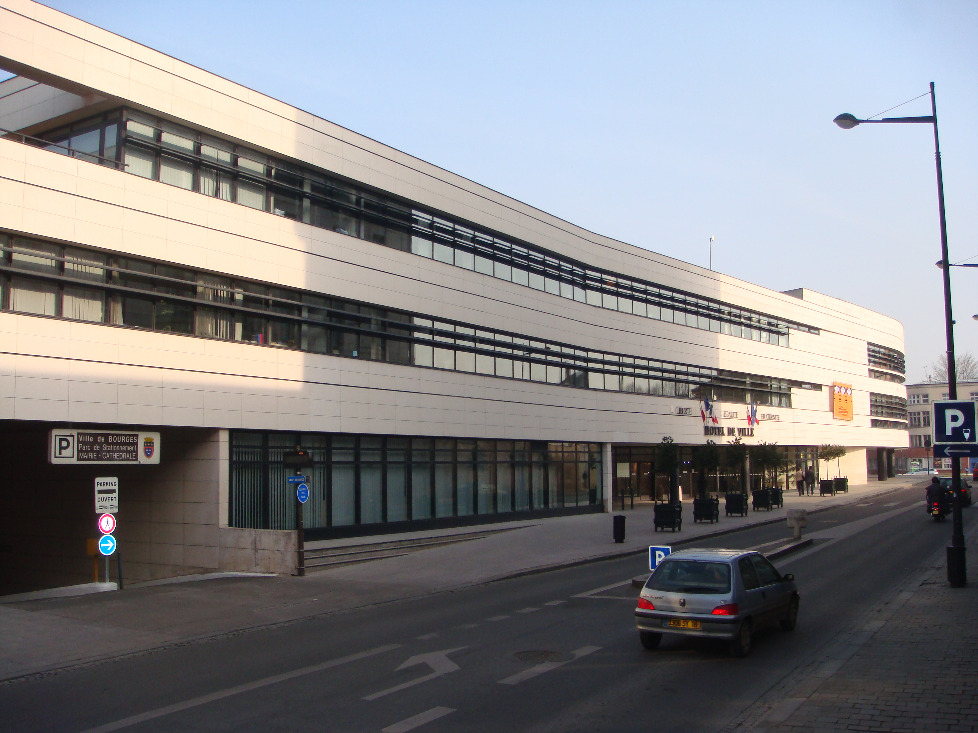 La Mairie de la ville de Bourges